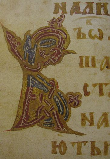 Инициал Фёдоровского Евангелия